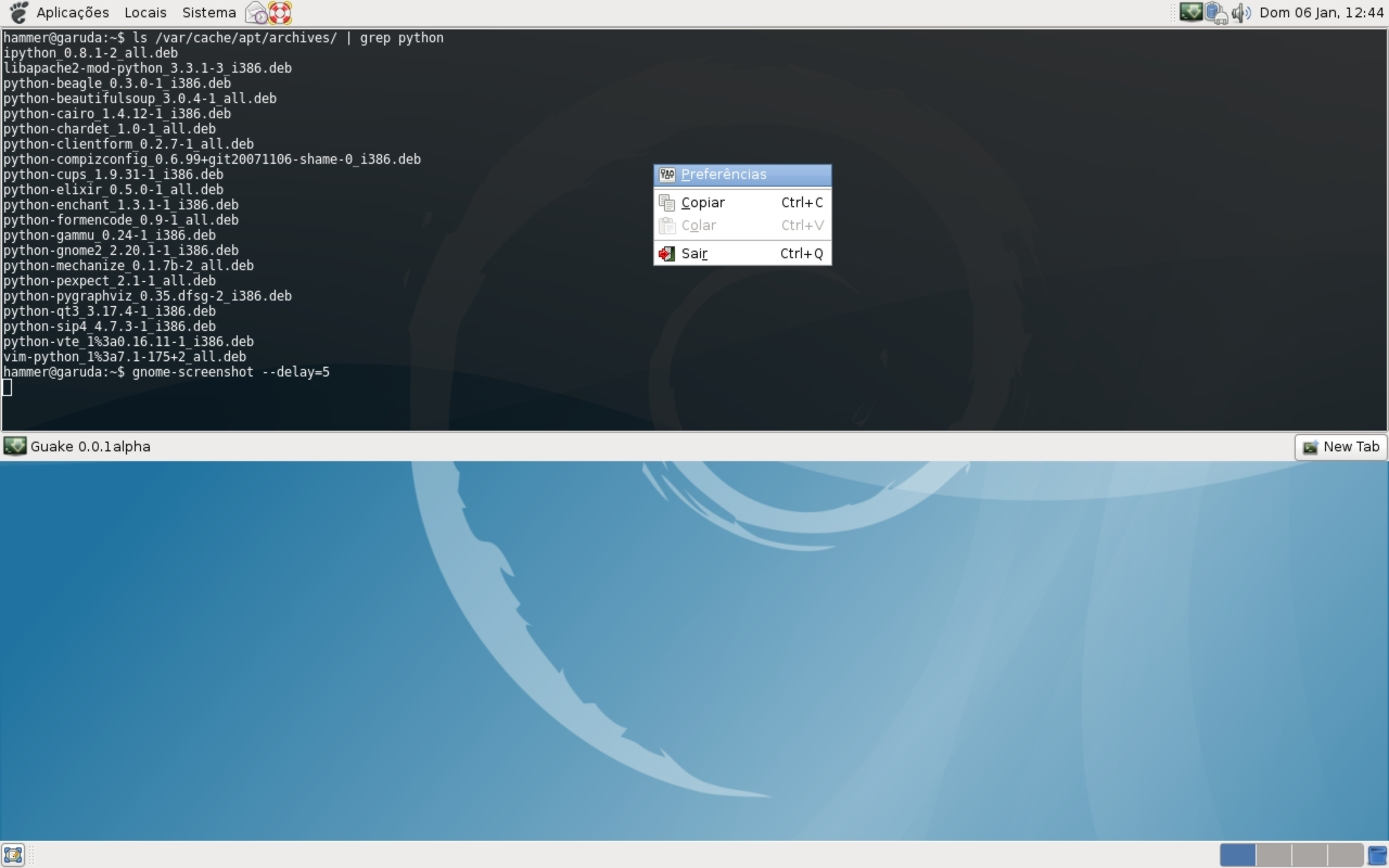 Guake on Debian Sid